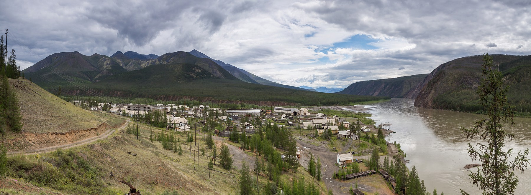 пгт.Предпорожный (Юбилейный) в Оймяконском улусе республики Якутия. Ныне упразднен.